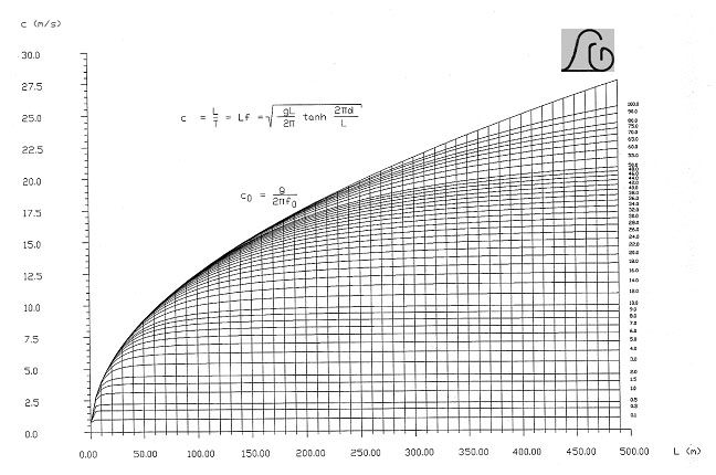 Phasengeschwindigkeit (Schwerewellen) als Funktion der Wellenlänge L und der Wassertiefe d, c(L,d)